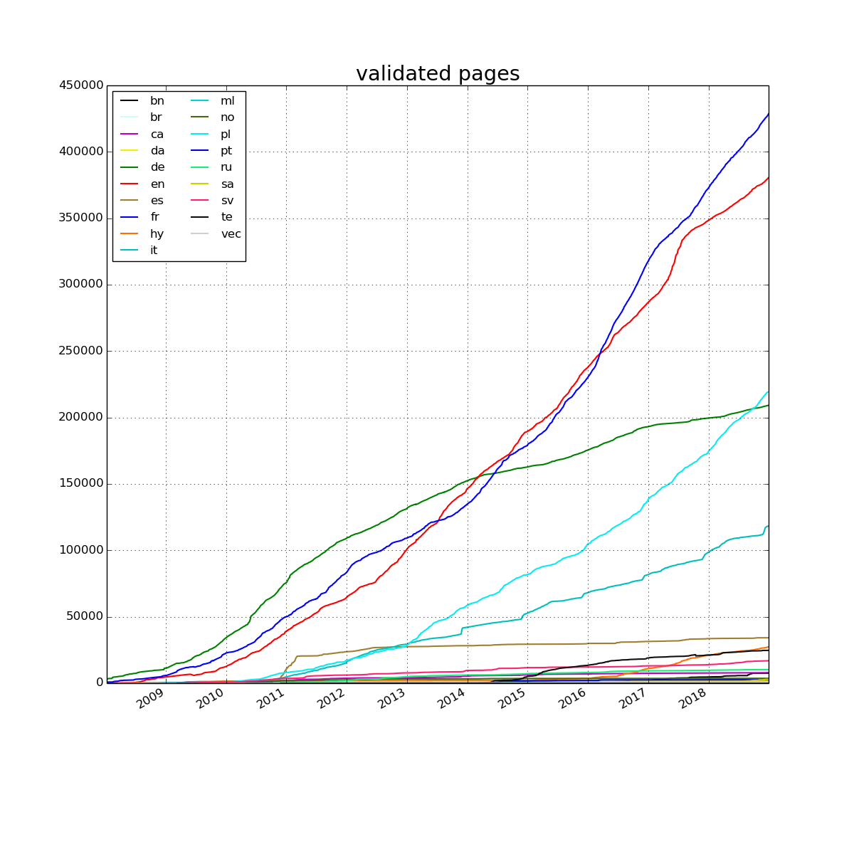 Nombre total de pages validées sur Wikisource jusqu'au 1er janvier 2019